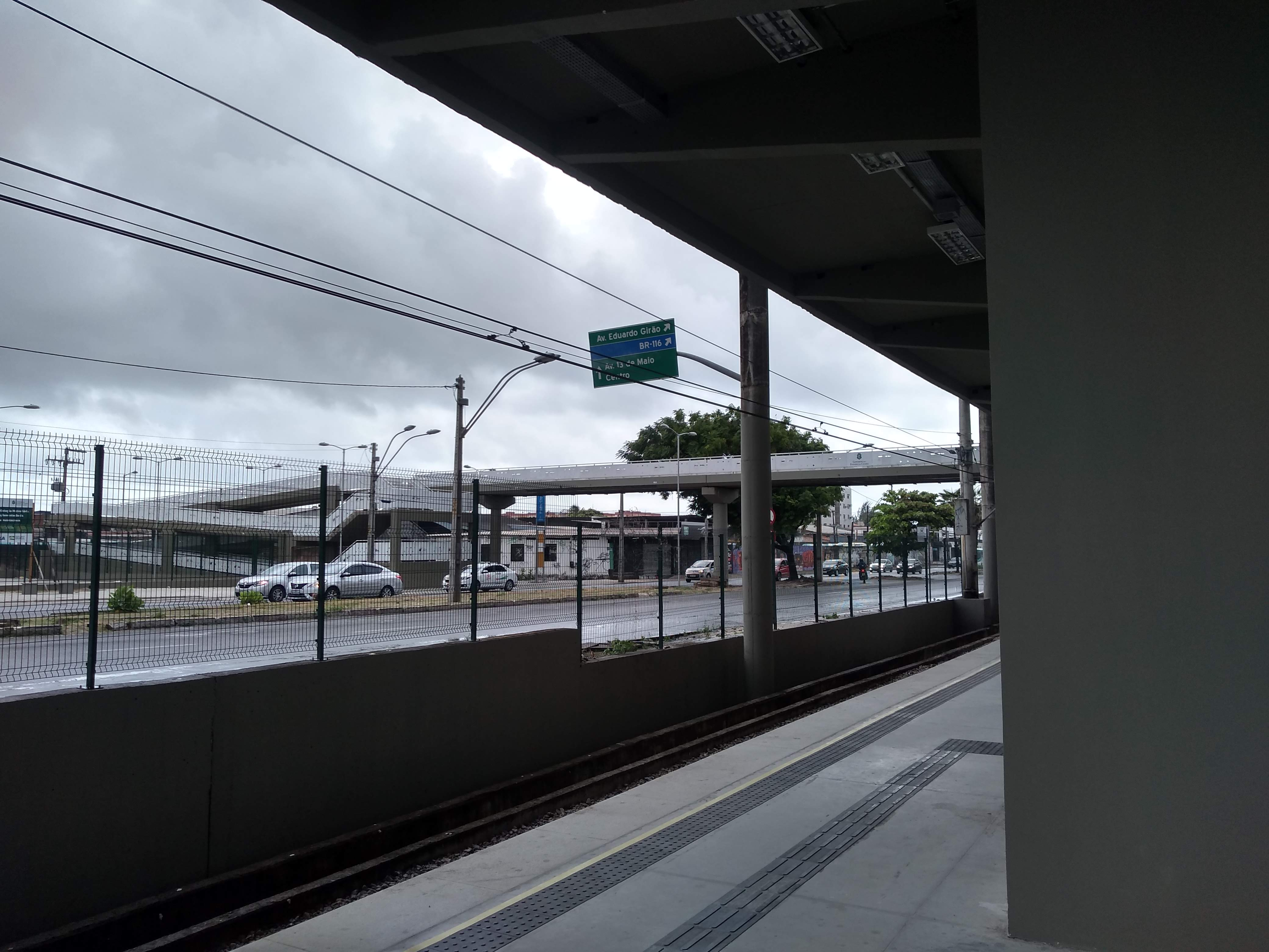 Passarela que da acesso a Estação Padre Cícero, ultima estação a ser entregue da Linha Sul do Metrô de Fortaleza em Dezembro de 2019.